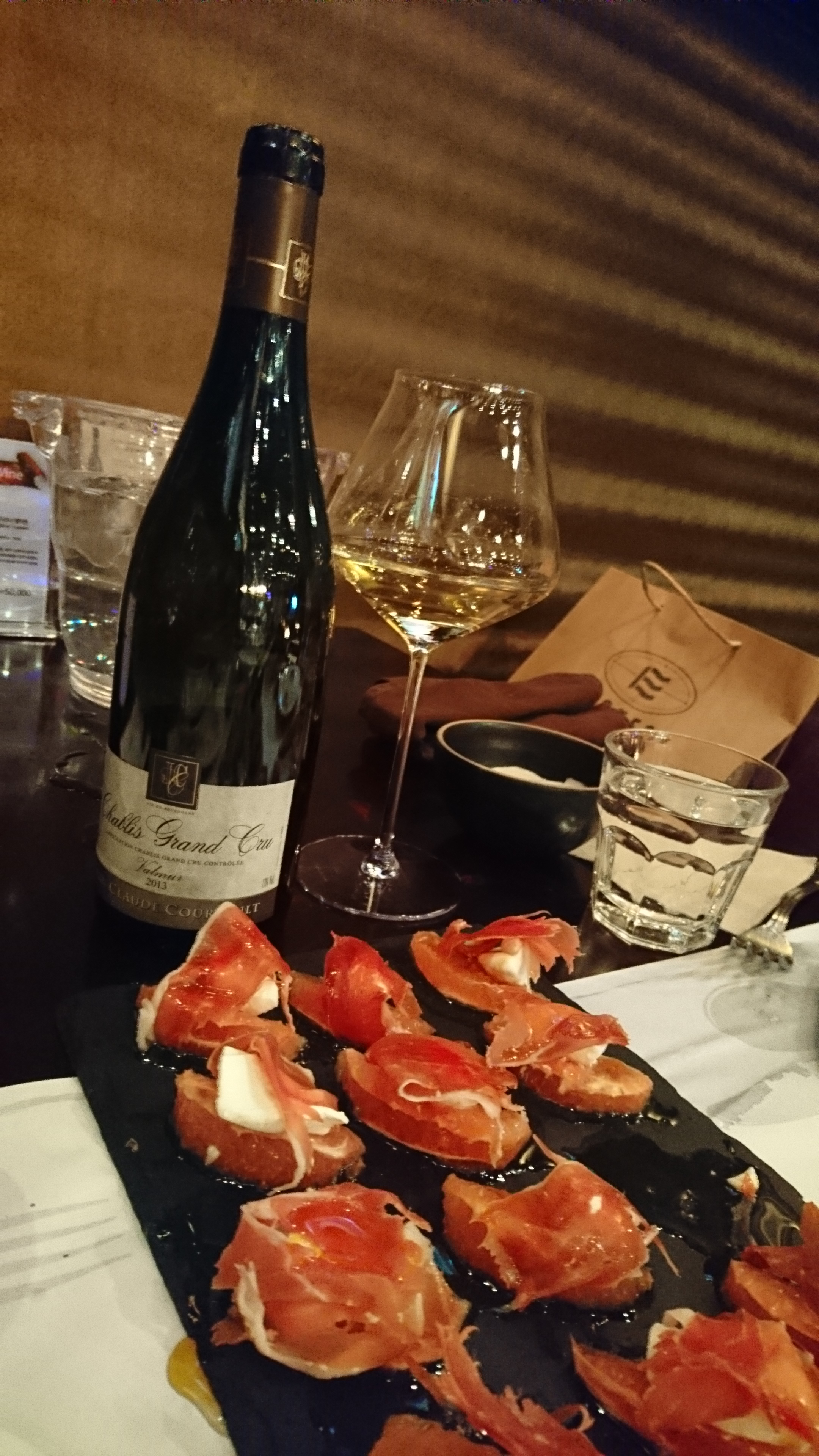 샤블리와인 발뮈르